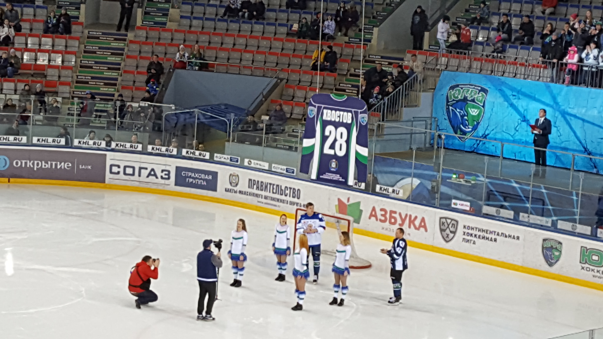 Während der Feierlichkeiten zum 10-jährigen Jubiläums des Eishockeyclubs HK Chanty-Mansijsk Jugra wird das Trikot von Jewgeni Chwostow unter das Hallendach gezogen